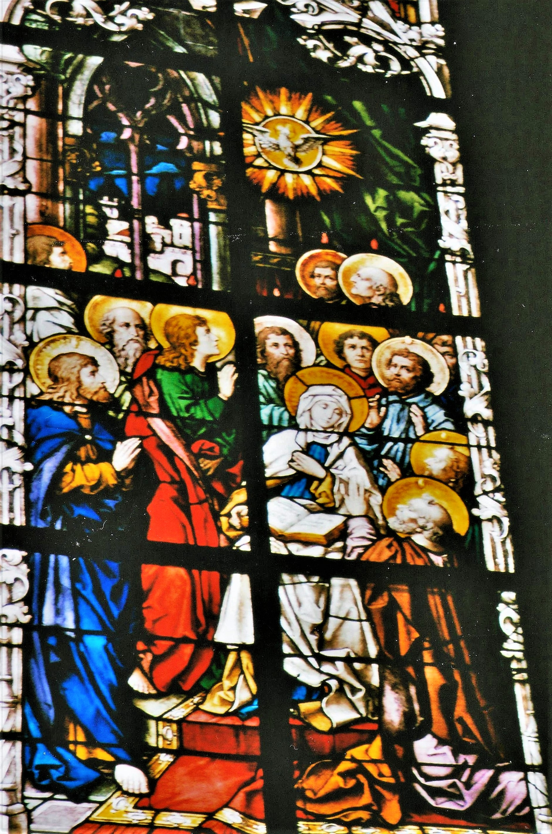 St. Michael (Lohr am Main), Chorfenster, Glorreicher Rosenkranz: Der uns den Heiligen Geist gesandt hat